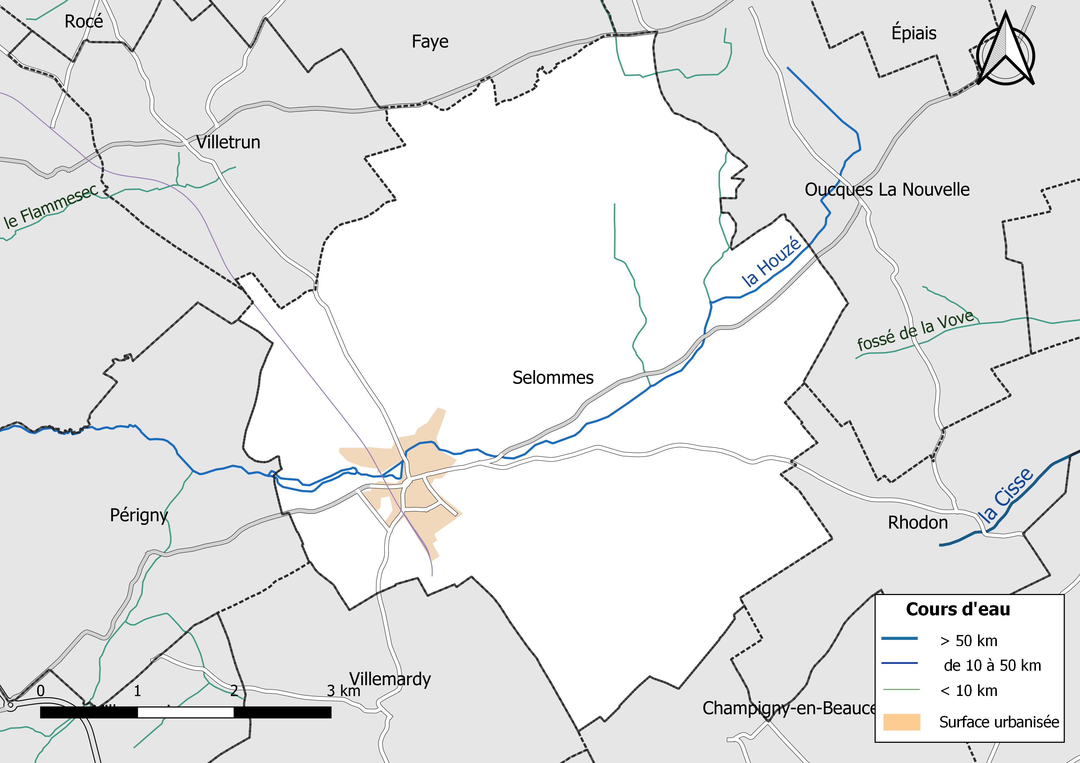 Carte du réseau hydrographique de la commune de Selommes (Loir-et-Cher, France).